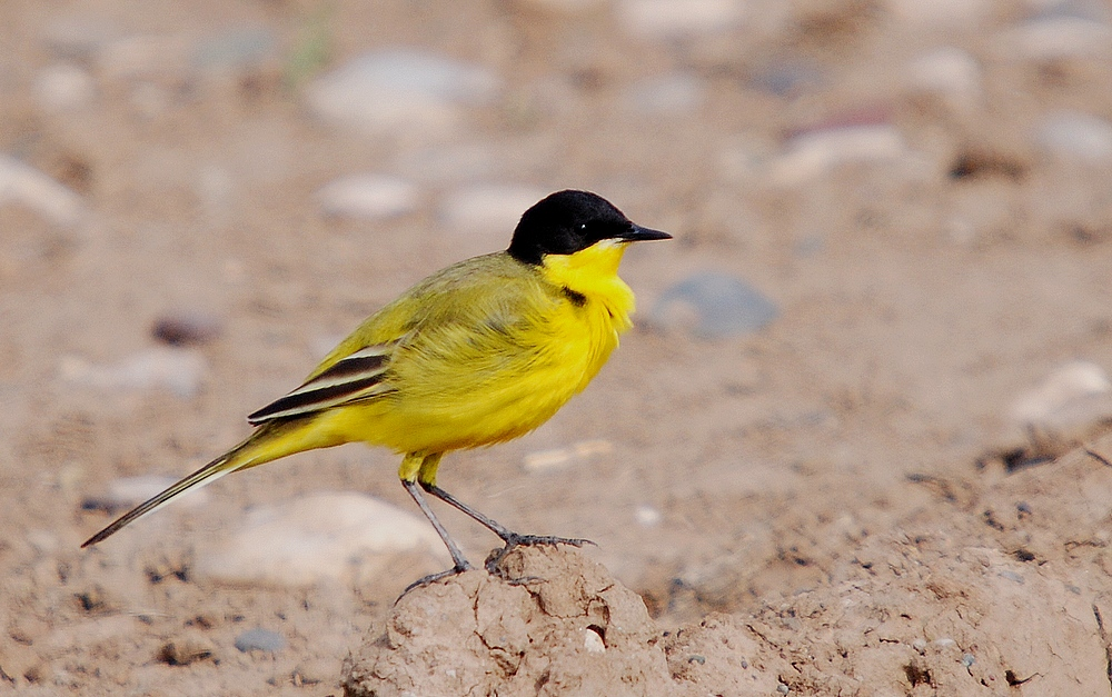 Kurdî: Navê Latînî:Motacilla flava Min bi xwe li Qoruxçîya kişandiye.